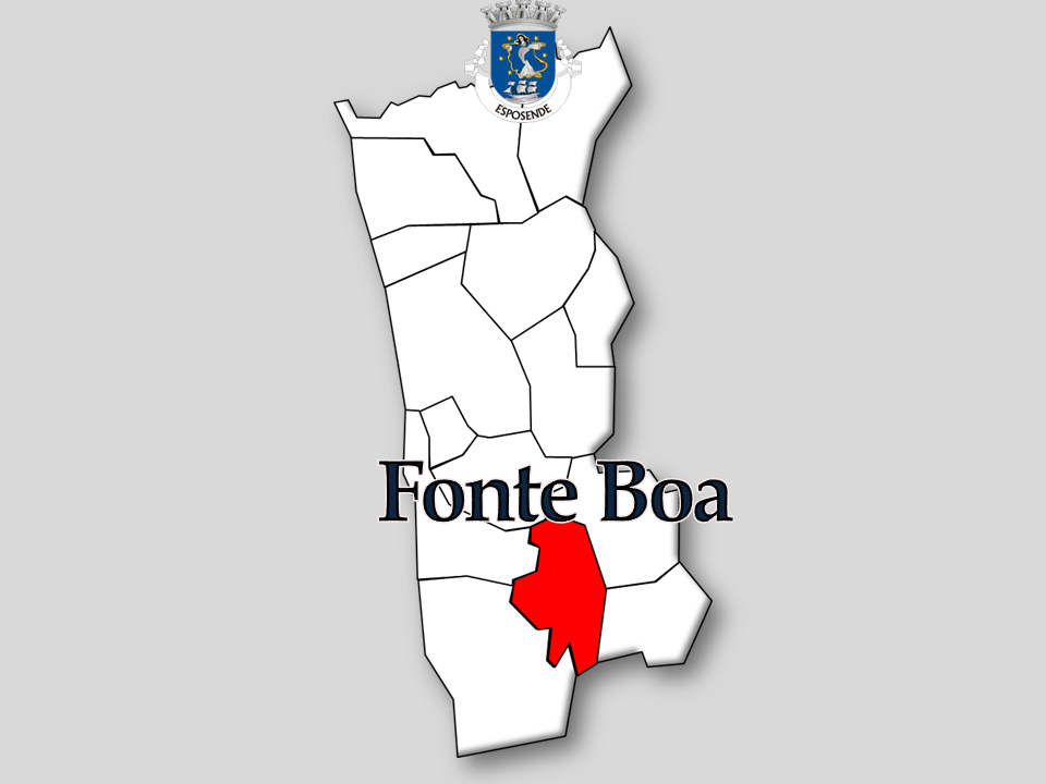 Censos 1864/2011